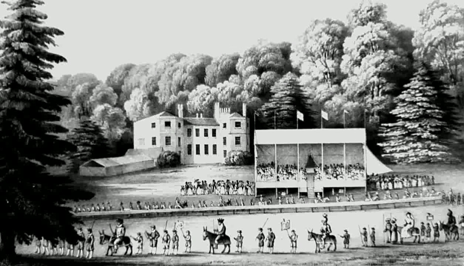 Abbildung des Wormsley-Turniers auf einer Lithografie